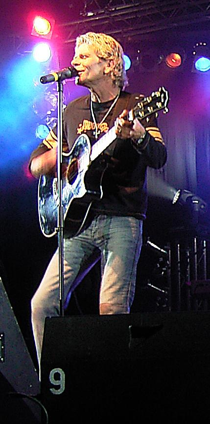 Matthias Reim beim Konzert im Familiengarten Eberswalde